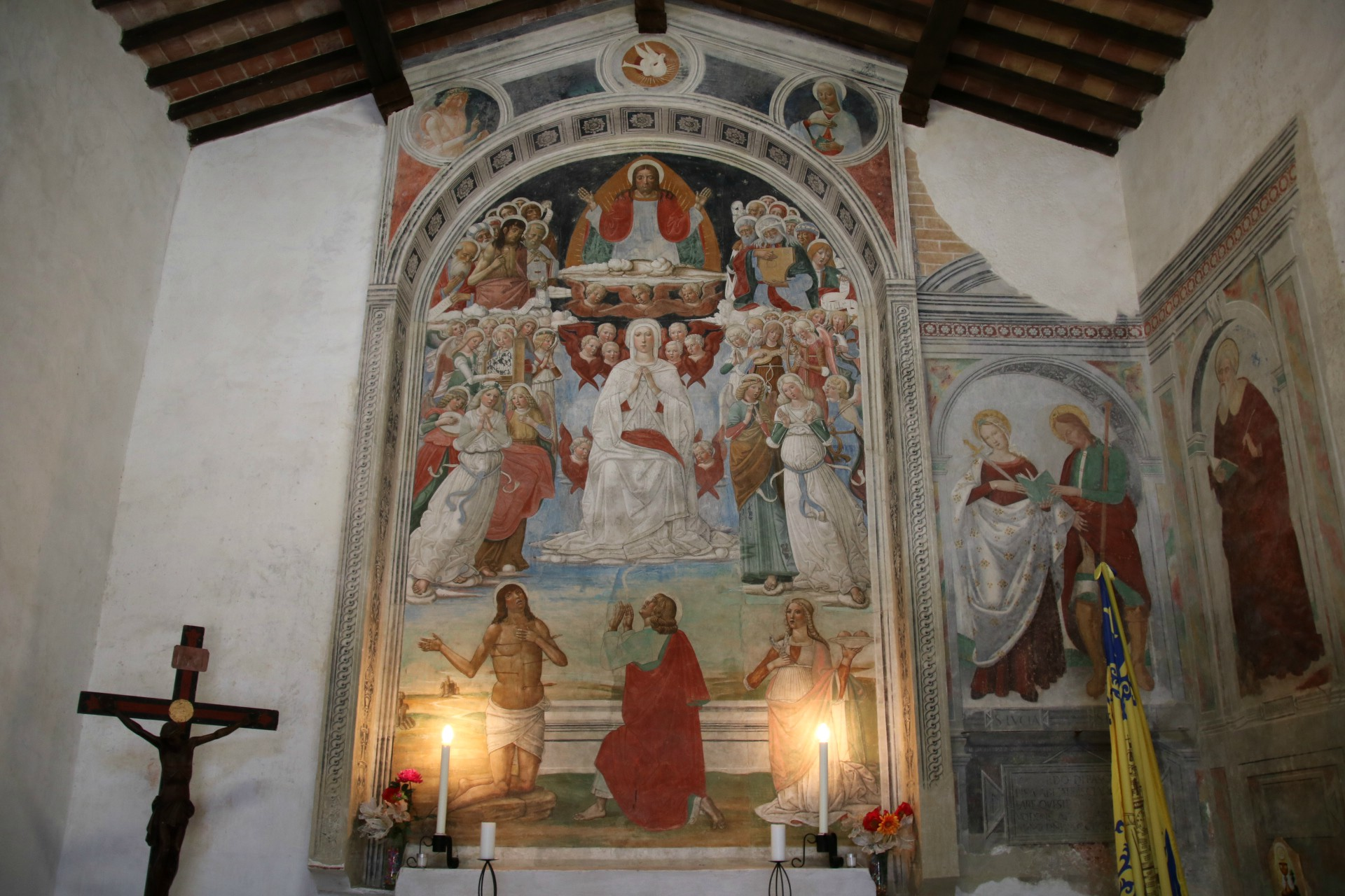 Chiesa dei Santi Sebastiano e Fabiano (Asciano)